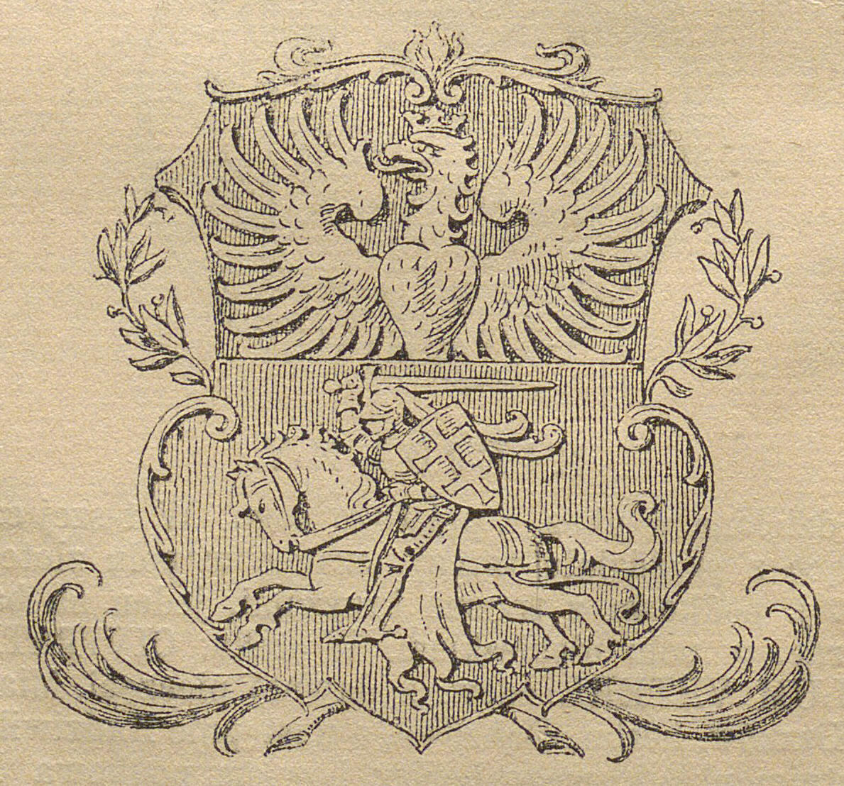 Беларуская (тарашкевіца): Беласток (Biełastok). Мескі герб з Пагоняй (Pahonia)